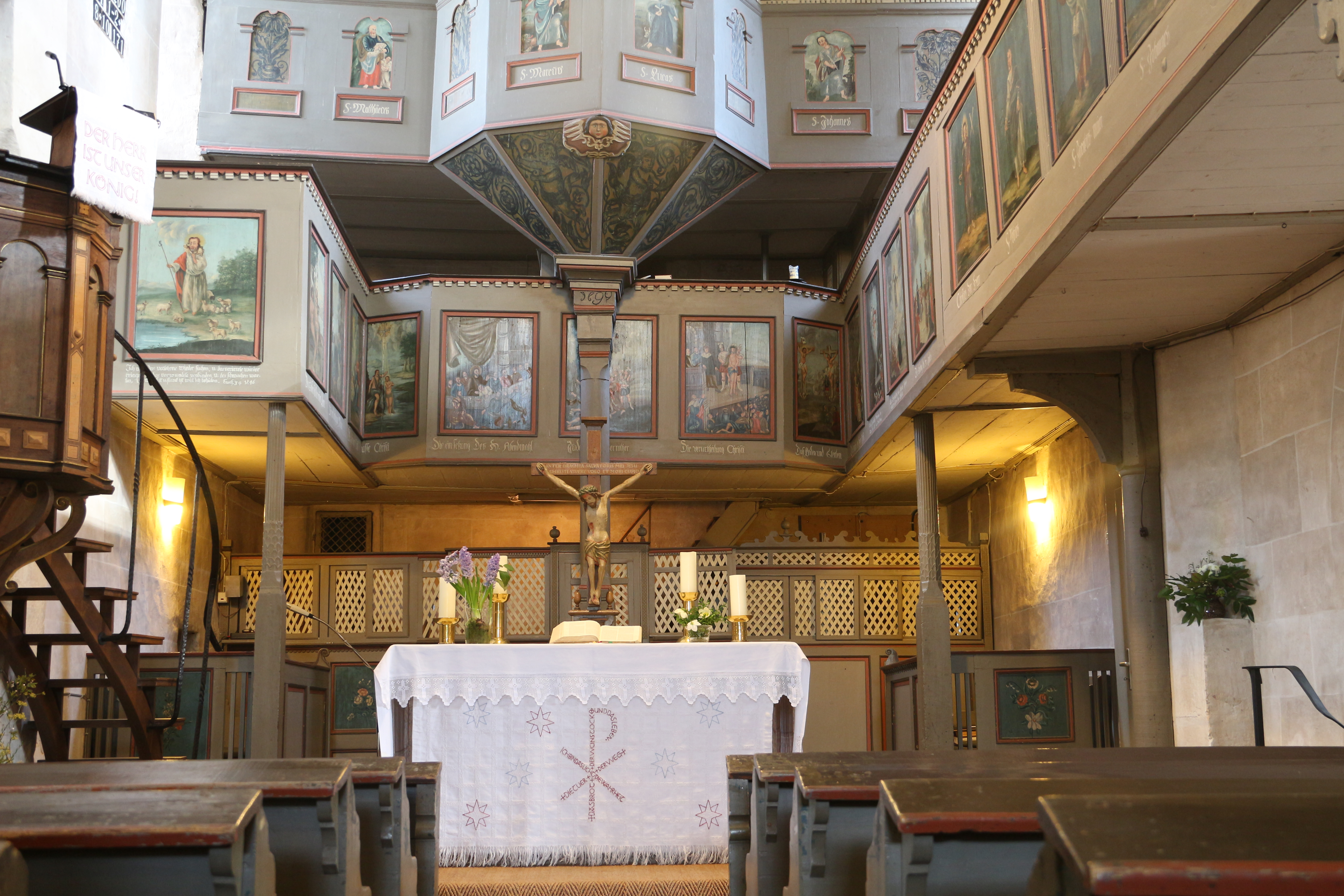 Innenansicht der Kirche von Lohra